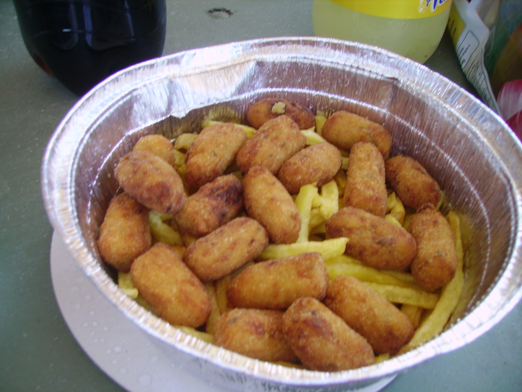 Croquetas con patatas fritas.